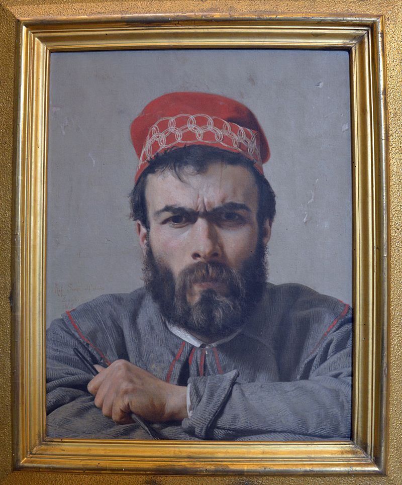 Emilio Zocchi, Porträt von Raffaello Sorbi